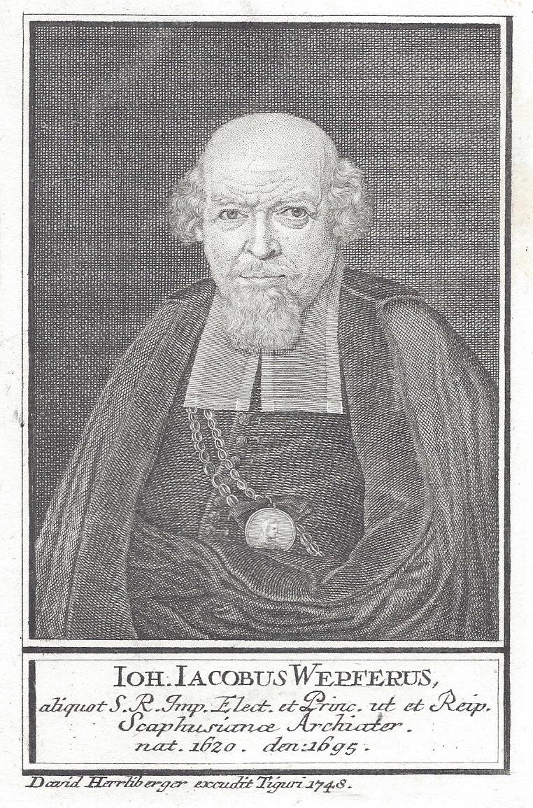 David Herrliberger (1697-1777): Johann Jakob Wepfer, Kupferstich.